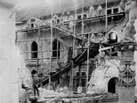 Rénovation du château du Landeron (NE) de 1889 à 1891 après la séparation des biens entre la bourgoisie et la commune politique.